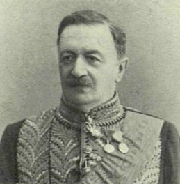 Герард, Николай Николаевич